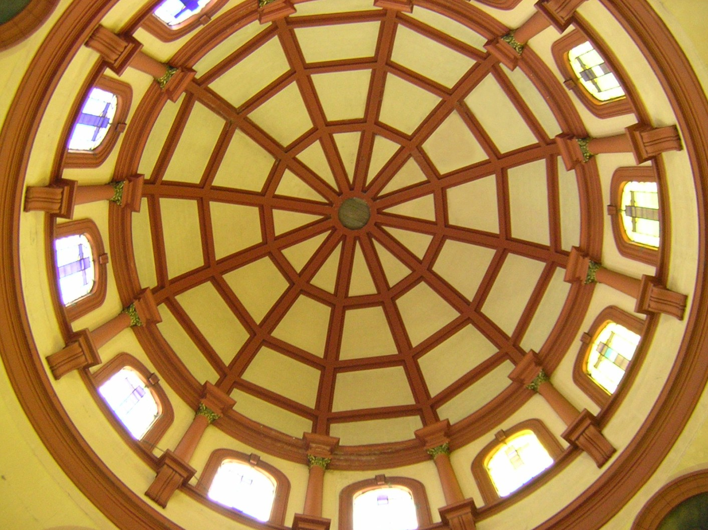 Iglesia de San Antonio. Medellín, Colombia.